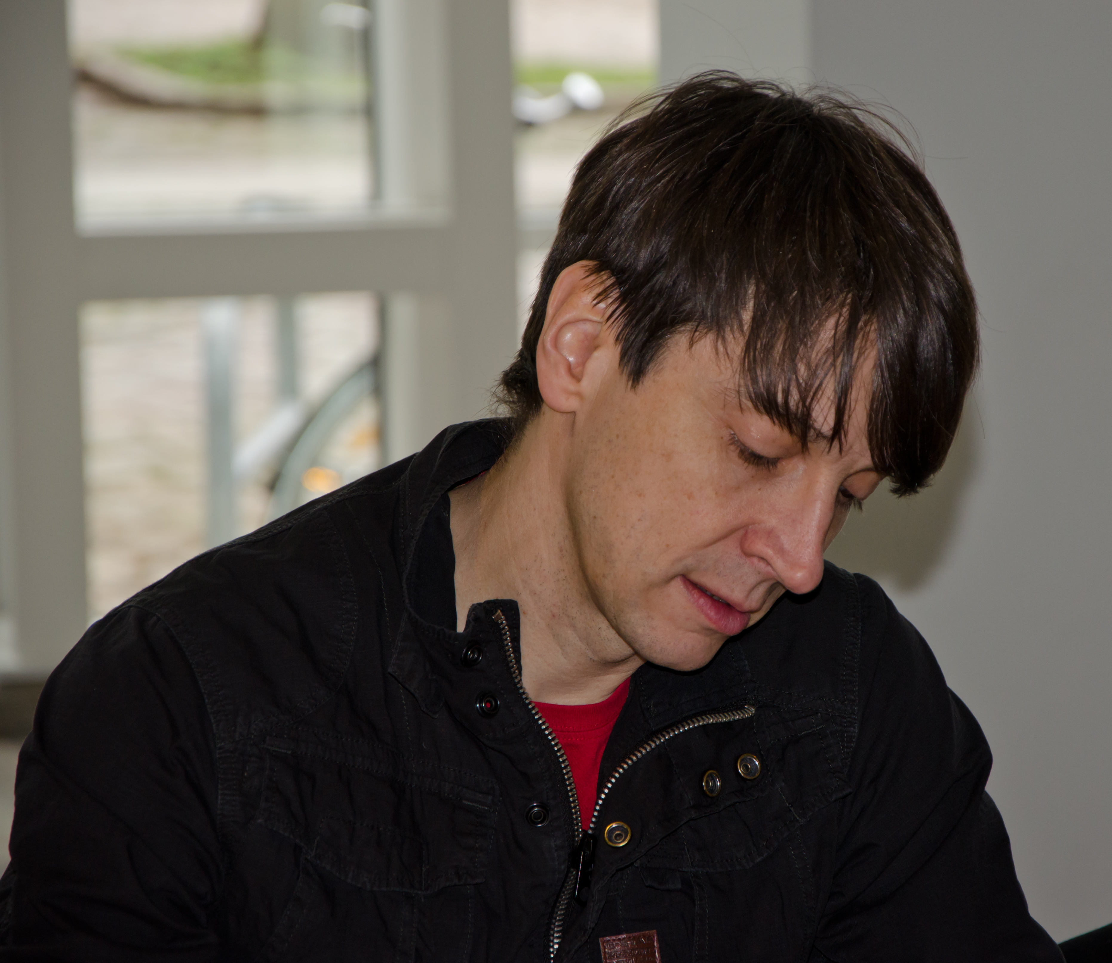 Florian Sitzmann bei einer Autogrammstunde in Hamburg